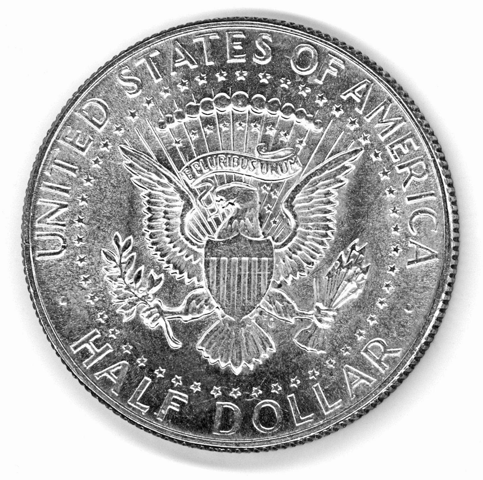 JFK 1968, Half Dollar, Rückseite, E PLURIBUS UNUM